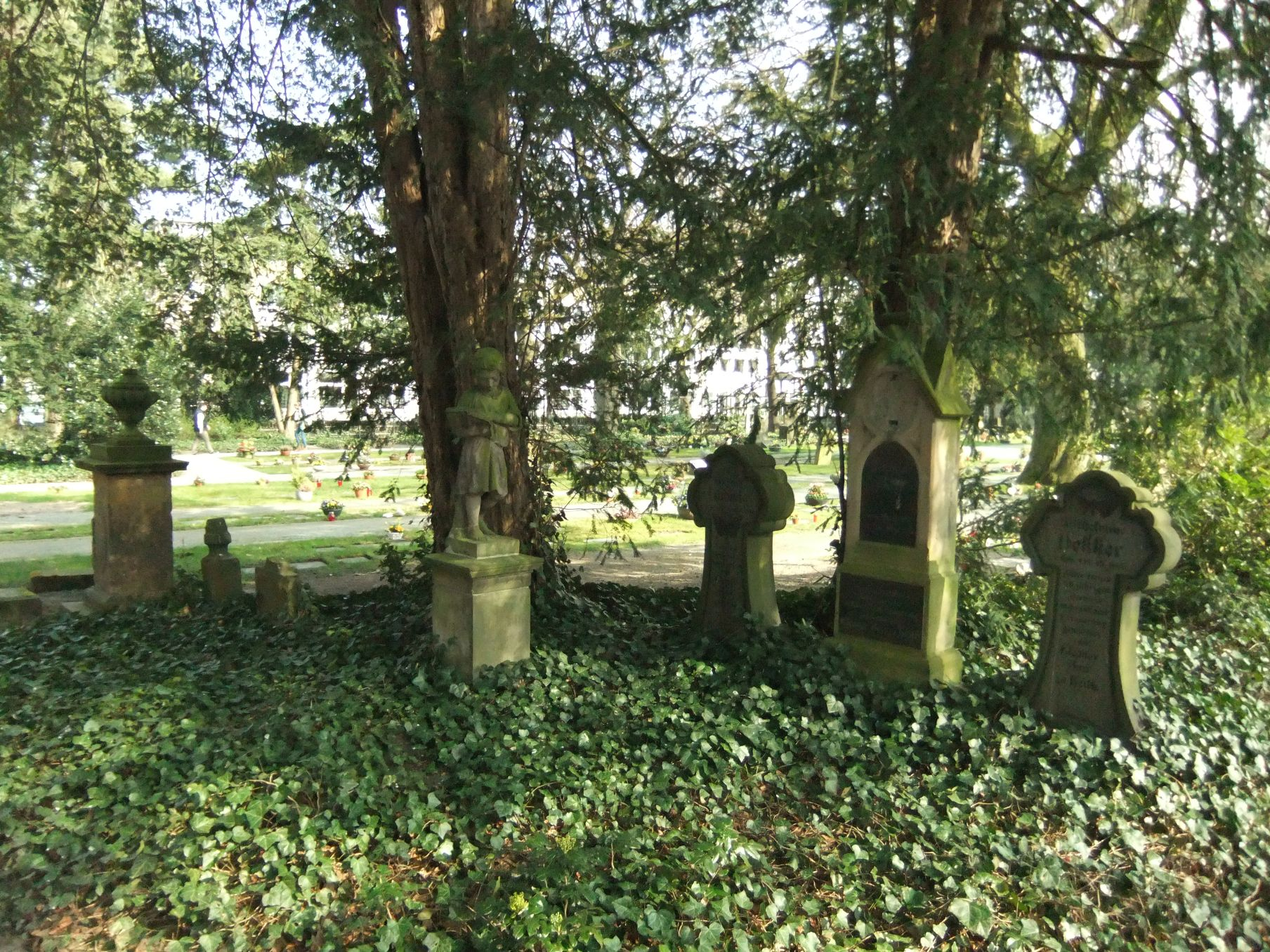 Grabmal Bozi Alter Friedhof Bielefeld.